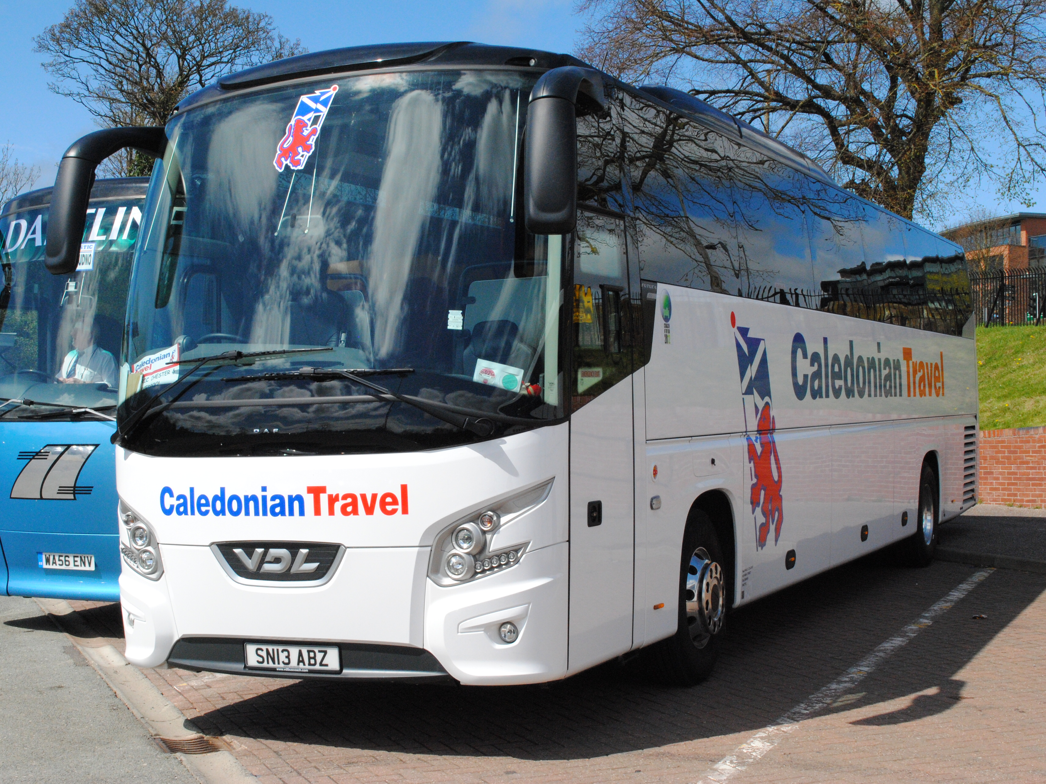 VDL Bova Futura